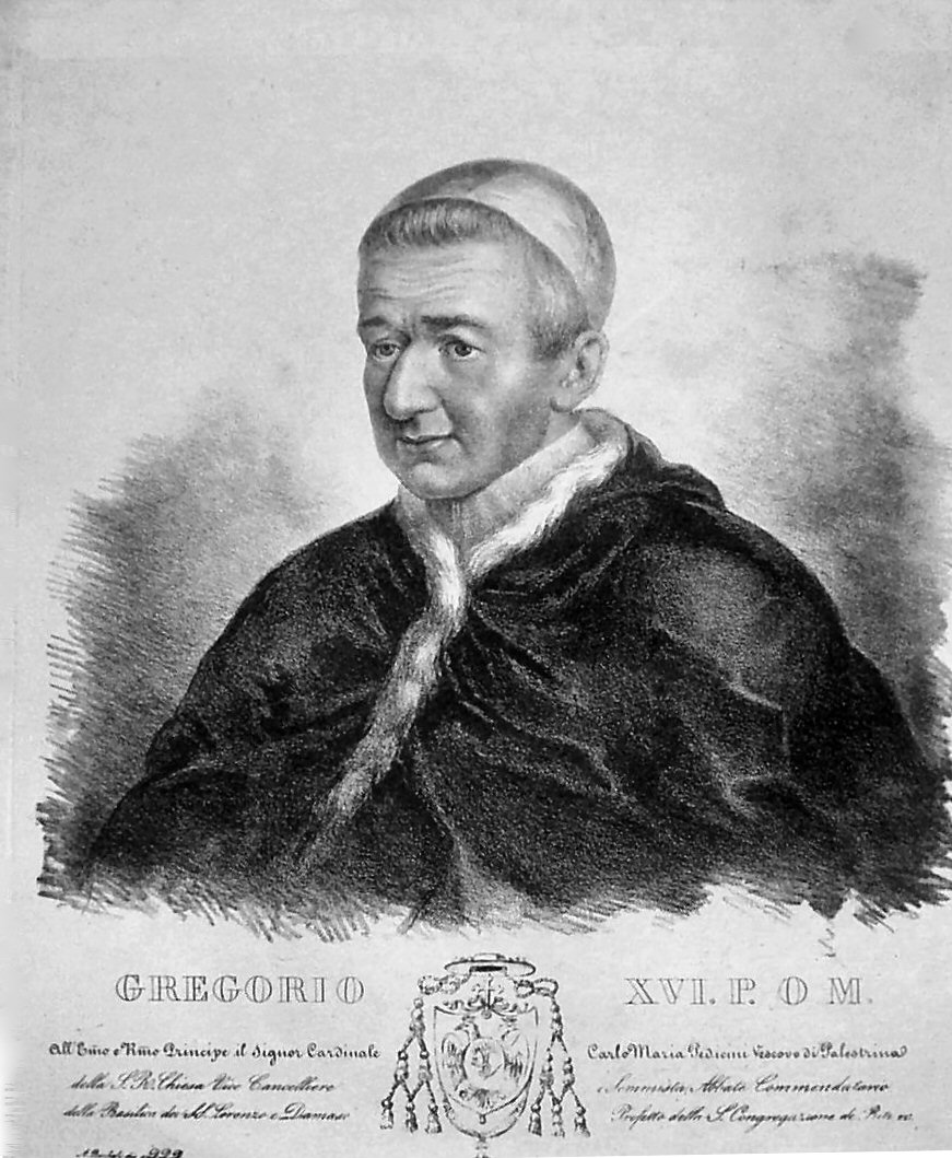 Gregor XVI., anonyme, zeitgenössische Lithographie